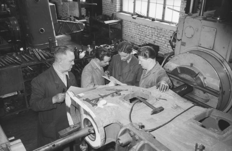 Zentralbild/Quaschinsky 27.4.1953 Die Werktätigen des volkseigenen Fräsmaschinenwerkes "Fritz Heckert" in Chemnitz kämpfen um fortschrittliche Normen. Bis zum 1. Mai 1953 wollen die Arbeiter des VEB WMW in Chemnitz für alle Arbeiten technisch begründete Normen schaffen und einführen. Zusammen mit den Technologen und Normenbearbeitern wurden anhand von Zeitmessungen zeitnormative- das sind Mittelwerte für die sich immer wiederholenden mit der Hand durchgeführten Arbeiten aufgestellt und mit der Zeitnormativtabelle die technisch begründete Normzeit an den einzelnen Maschinen errechnet. Jeder Arbeiter liest die neue Normzeit von der grünen Normkarte ab auf der genau vorgeschrieben sind: die Bearbeitungsmaschine, die Fertigungstechnik, jeder einzelne Arbeitsgang mit den technisch begründeten Normzeiten, die zu verwendenden Werkzeuge, Vorrichtungen usw. UBz: Auf der Grundlage der Normative und der technologischen Werte konnten nun die Normkarten für die verschiedenen Arbeitsgänge angelegt werden. (v.l.n.r.) Meister Grosser, Normenbearbeiter Neubert, Technologe Steger und der Horizontalbohrer Schachoff bei der Erläuterung und Überprüfung der Normkarte.